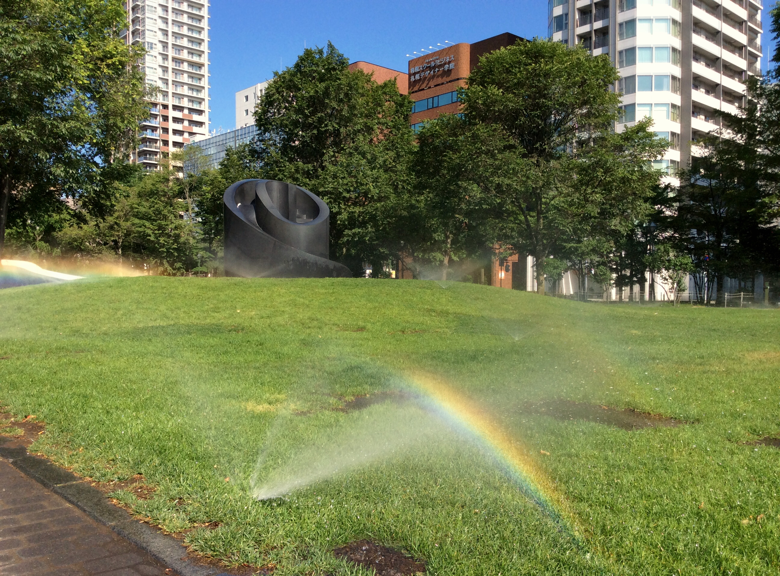 ブラック・スライド・マントラ（Black Slide Mantra）